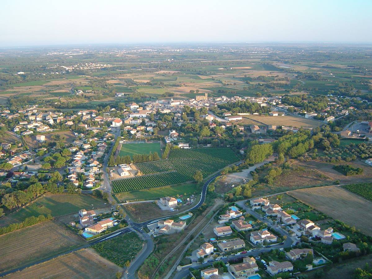 Vue aérienne de St Christol